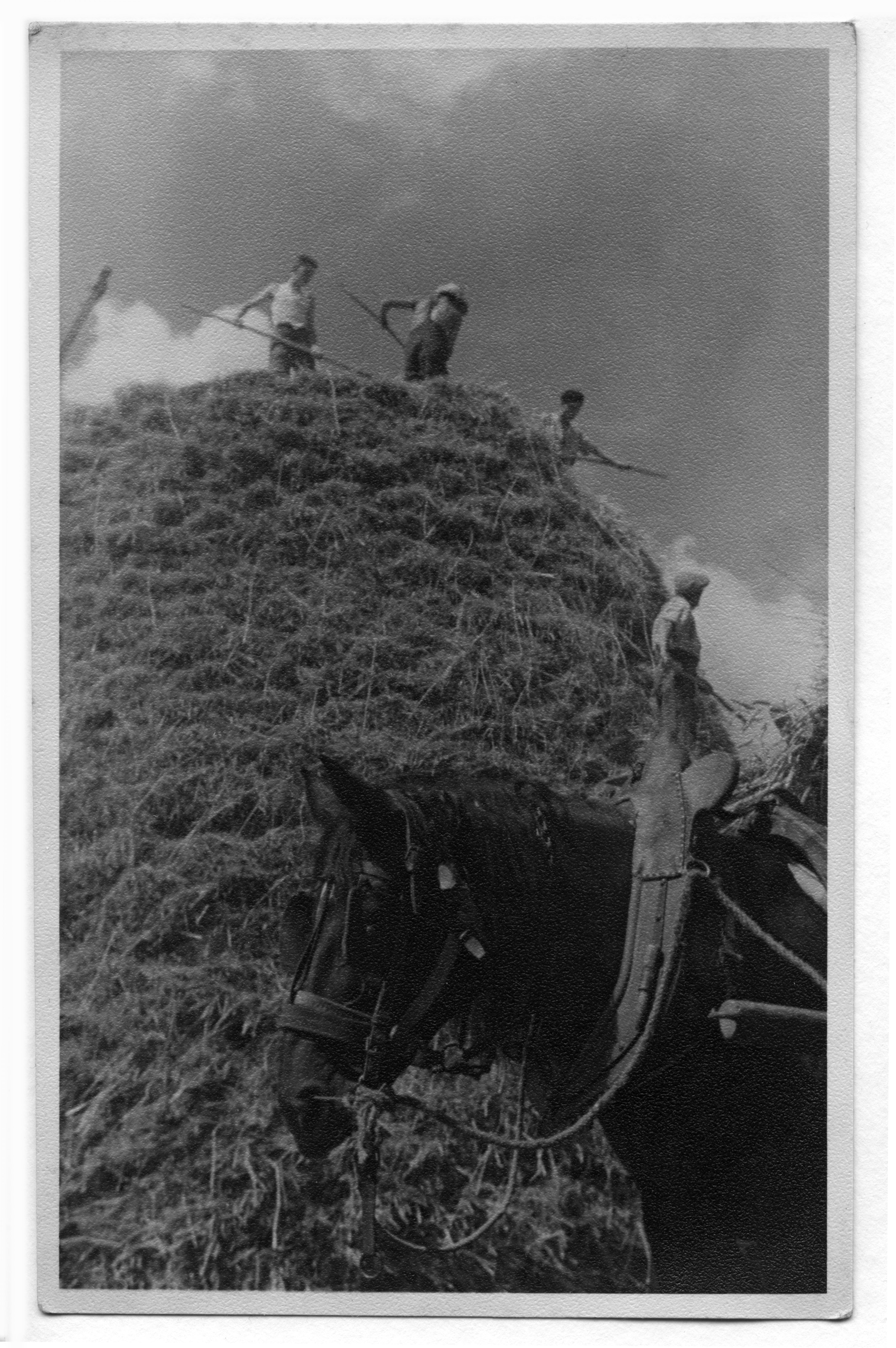 Constitution d'une meule de foin à La Chapelle-Saint-Laud en 1944